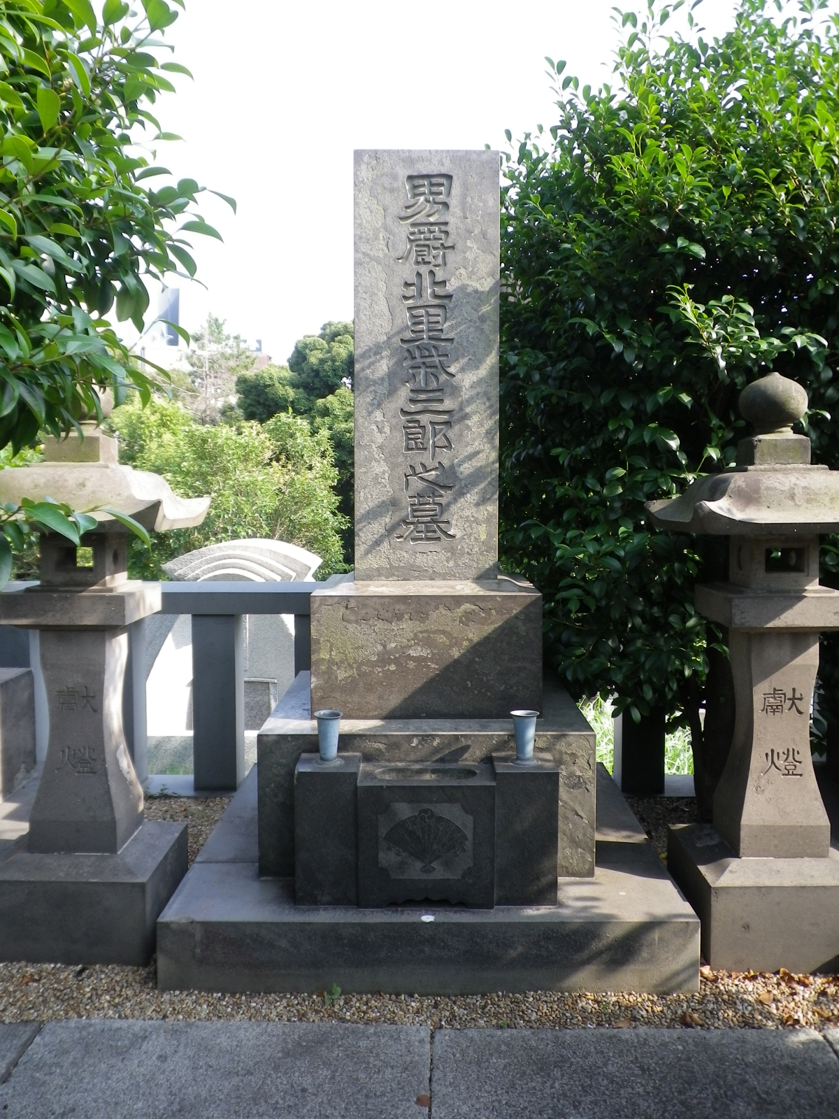 北里柴三郎の墓